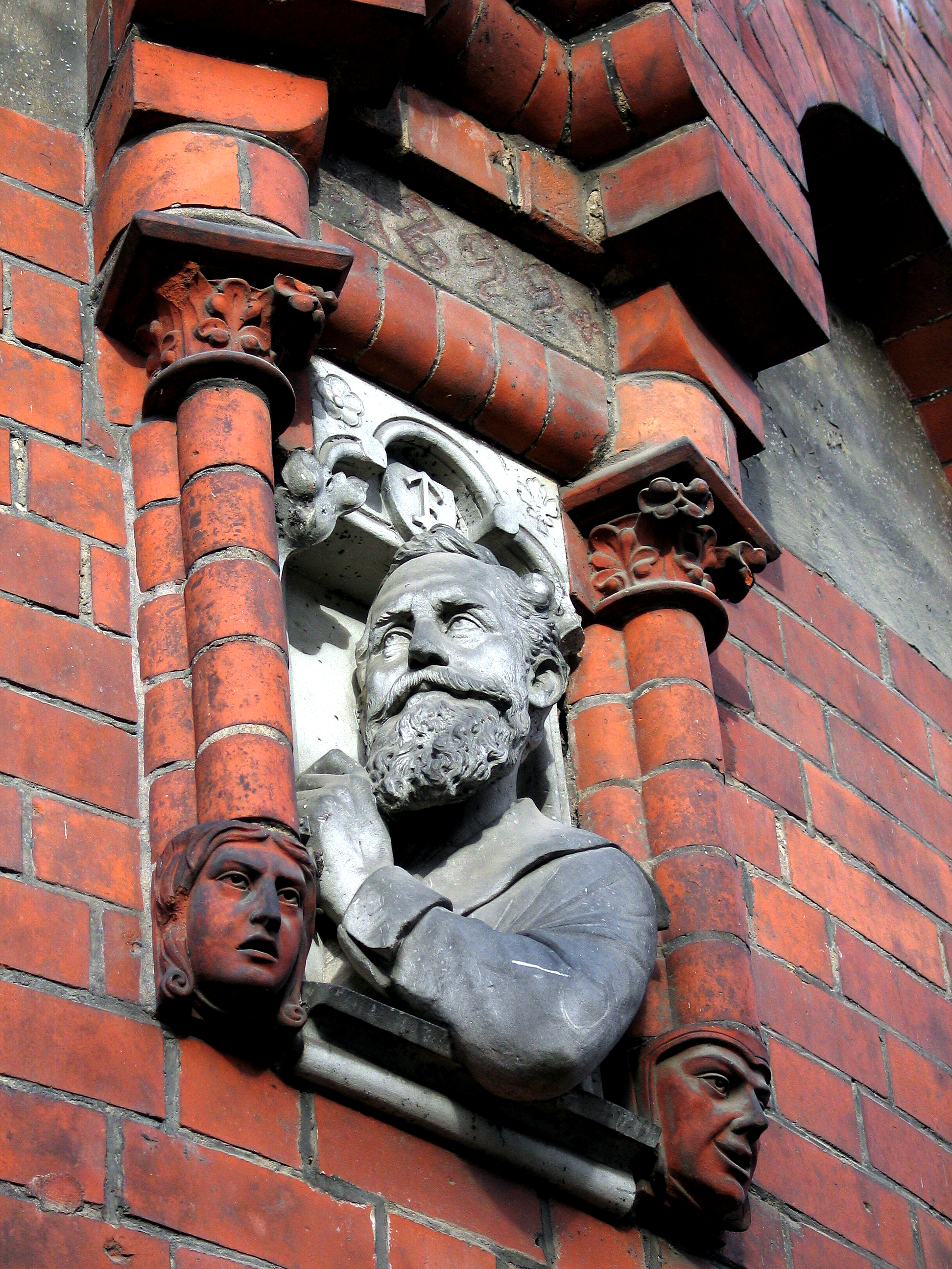 Halbplastisches Relief mit dem Bildnis des Architekten Karl Mohrmann am Turm seines 1900 erbauten eigenen Wohnhauses am Herrenhäuser Kirchweg 11 in Hannover, Stadtteil Nordstadt. Über dem Kopf des Architekten ist die Künstlersignatur zu erkennen ...